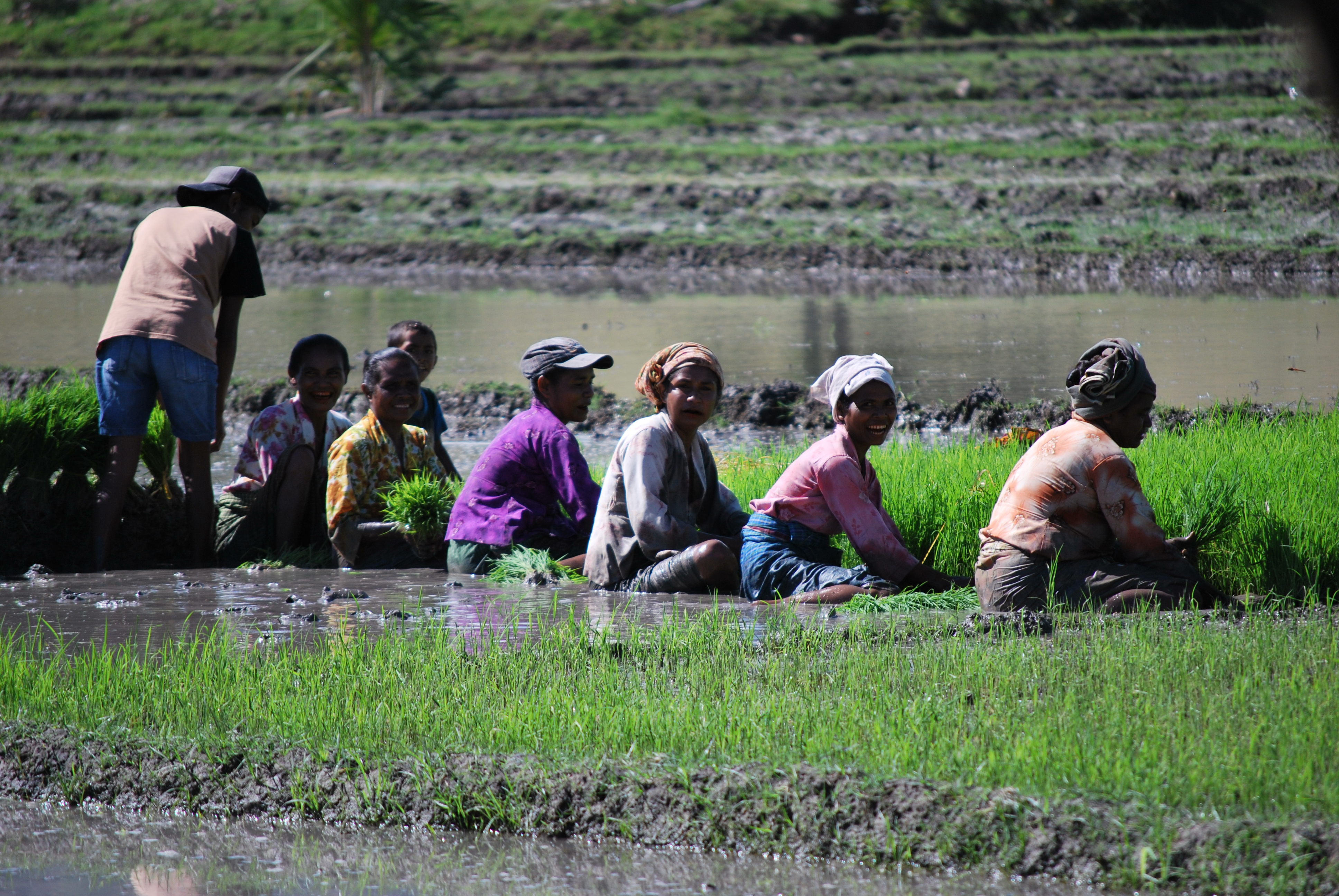 Reisfelder in Oemelo, Lifau, Oecusse